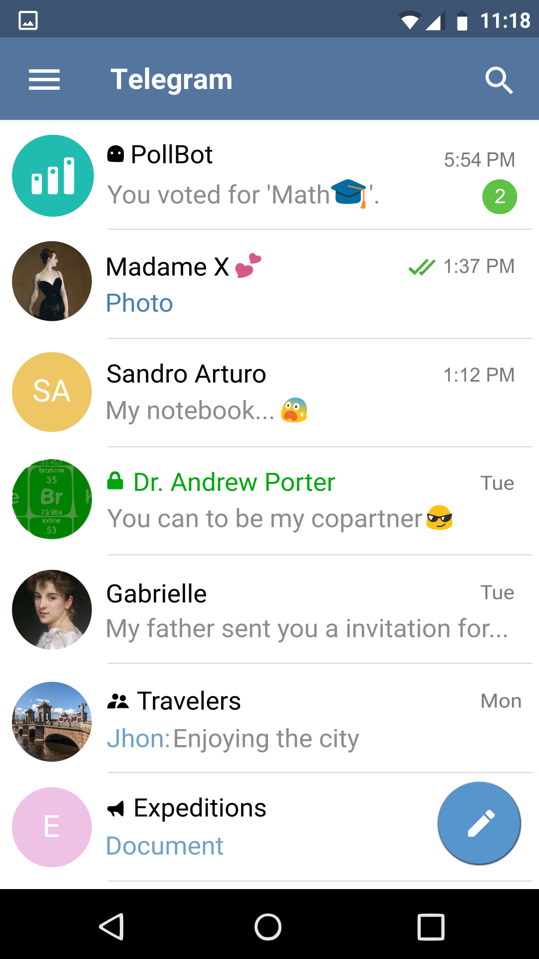 Captura de pantalla de Telegram para Android. Esta versión ha sido parcialmente vectorizado y derivado de File:Telegram Android screenshot v3.3.svg. Contiene texto basado en la fuente Roboto para realizar escalas, Emojis del proyecto Noto e imágenes de Wikimedia Commons.